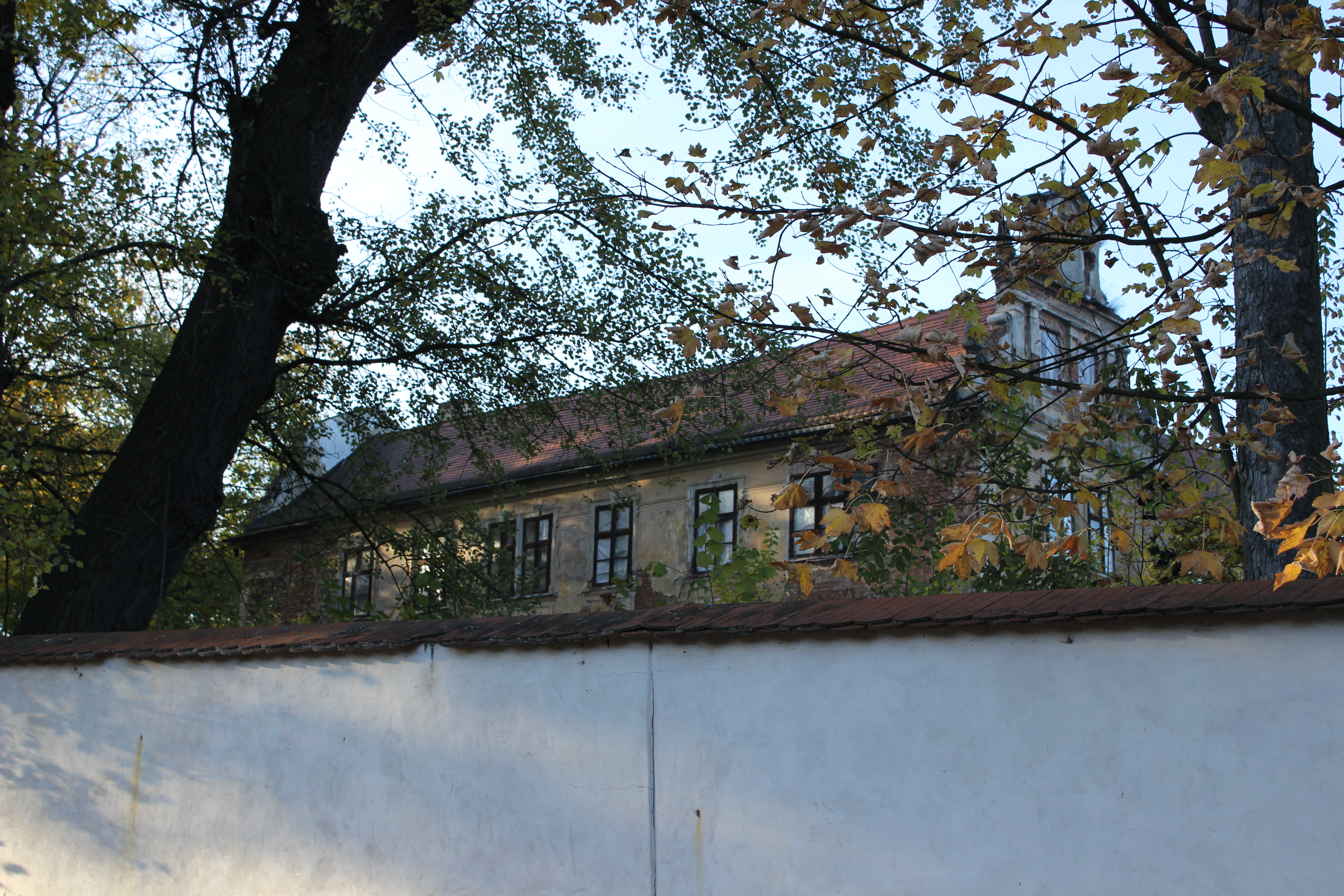 Zámek v Lukách, části Verušiček.